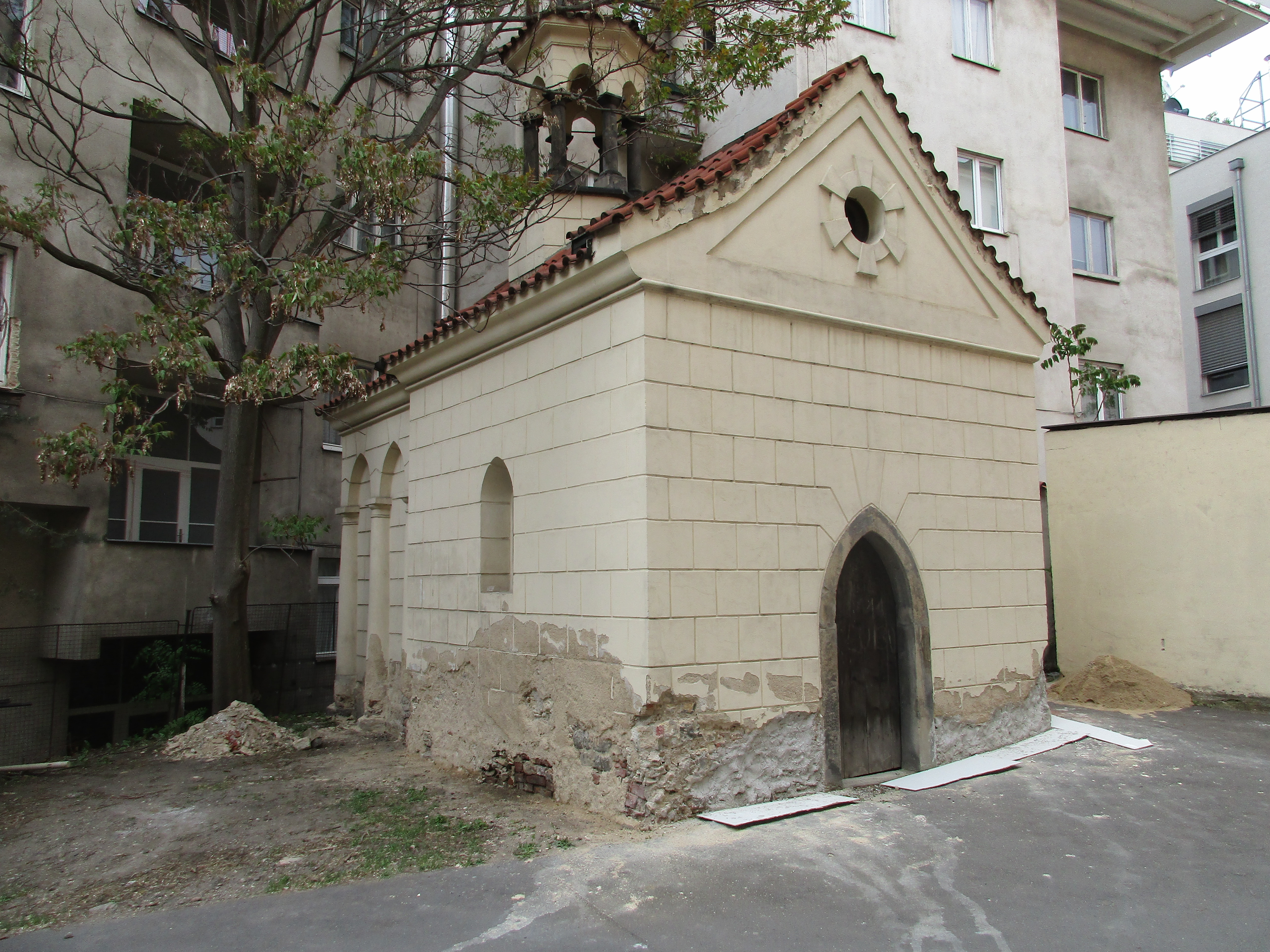 Kaple Božího hrobu při zaniklém kostele svatého Petra a Pavla na Zderaze.